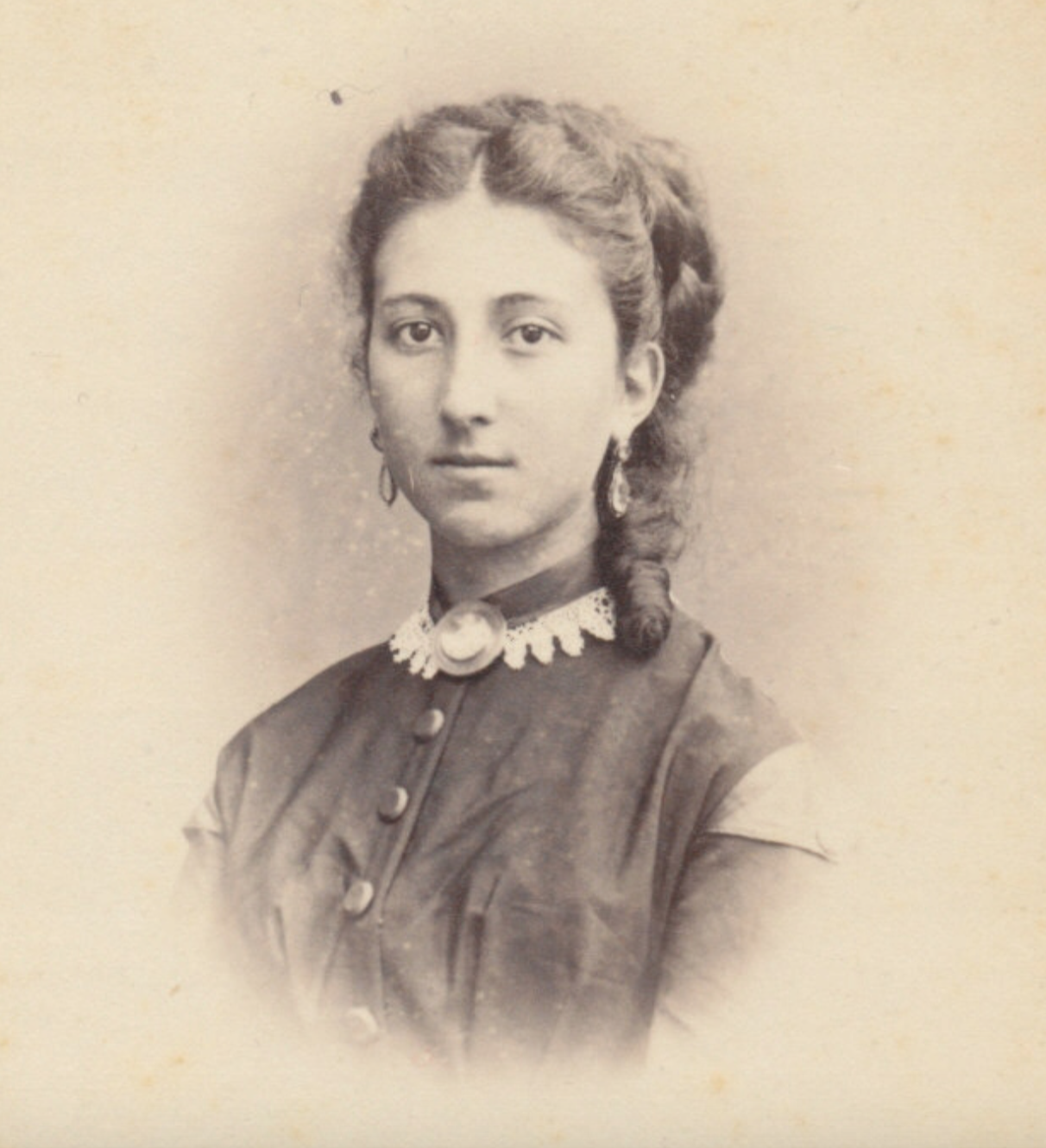 Maria z Ostaszewskich Dzieduszycka (1851-1918)